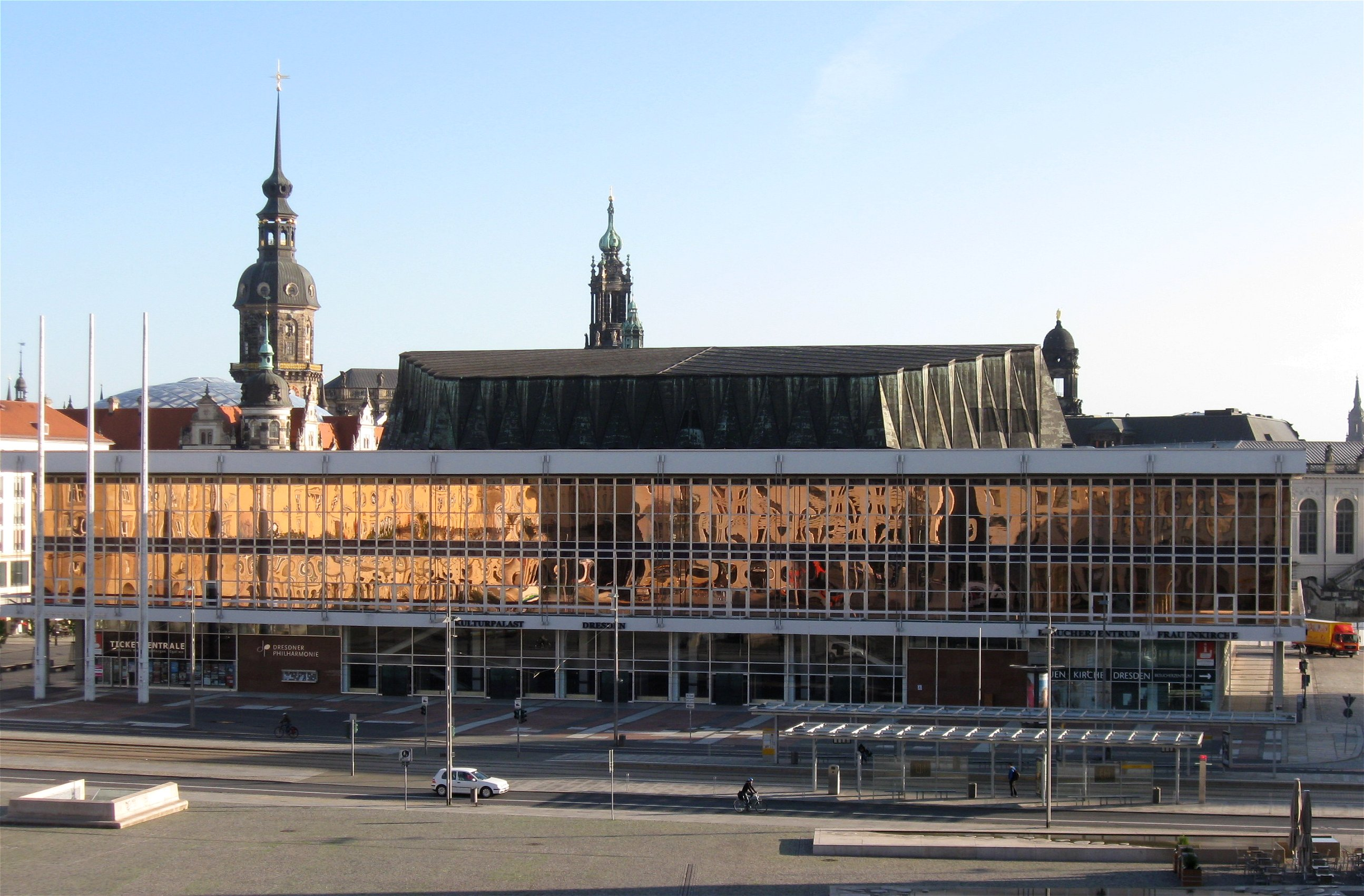 Kulturpalast in Dresden